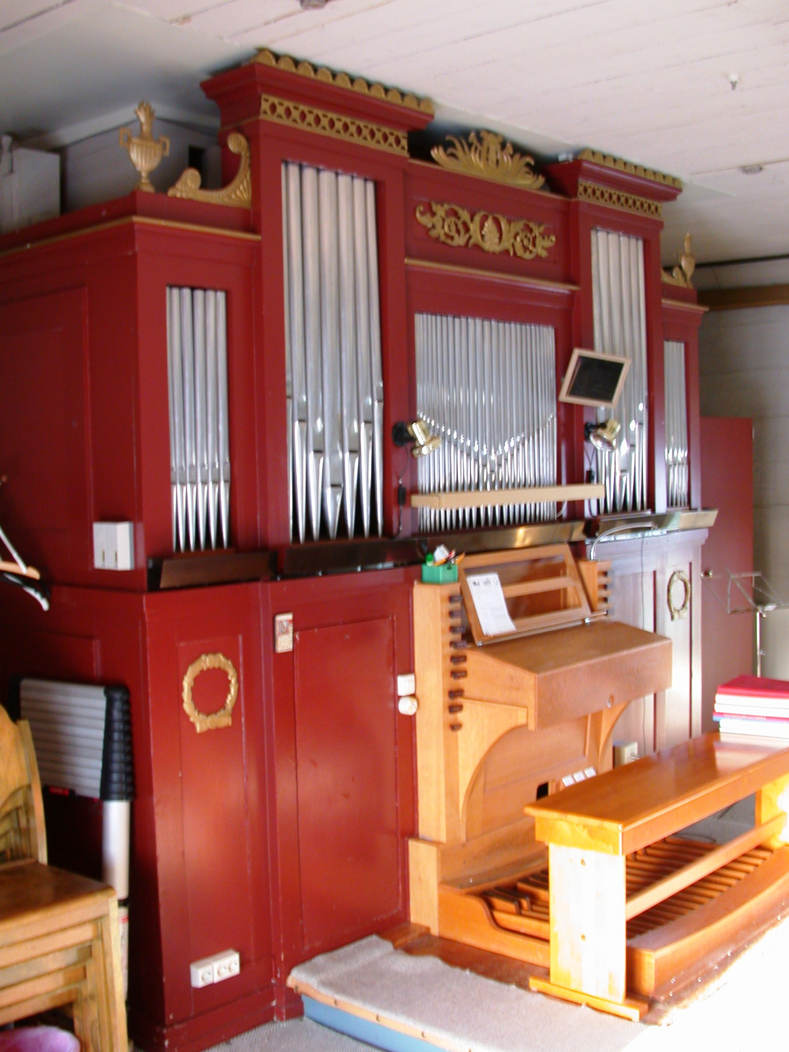 Kråksmåla church, Nybro, Sweden